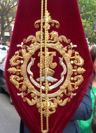 Escudo que aparece en el bacalao de la Hermandad